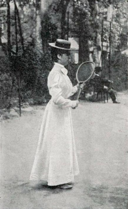 Hélène Pévost, championne de France de tennis en 1900 (ile de Puteaux).